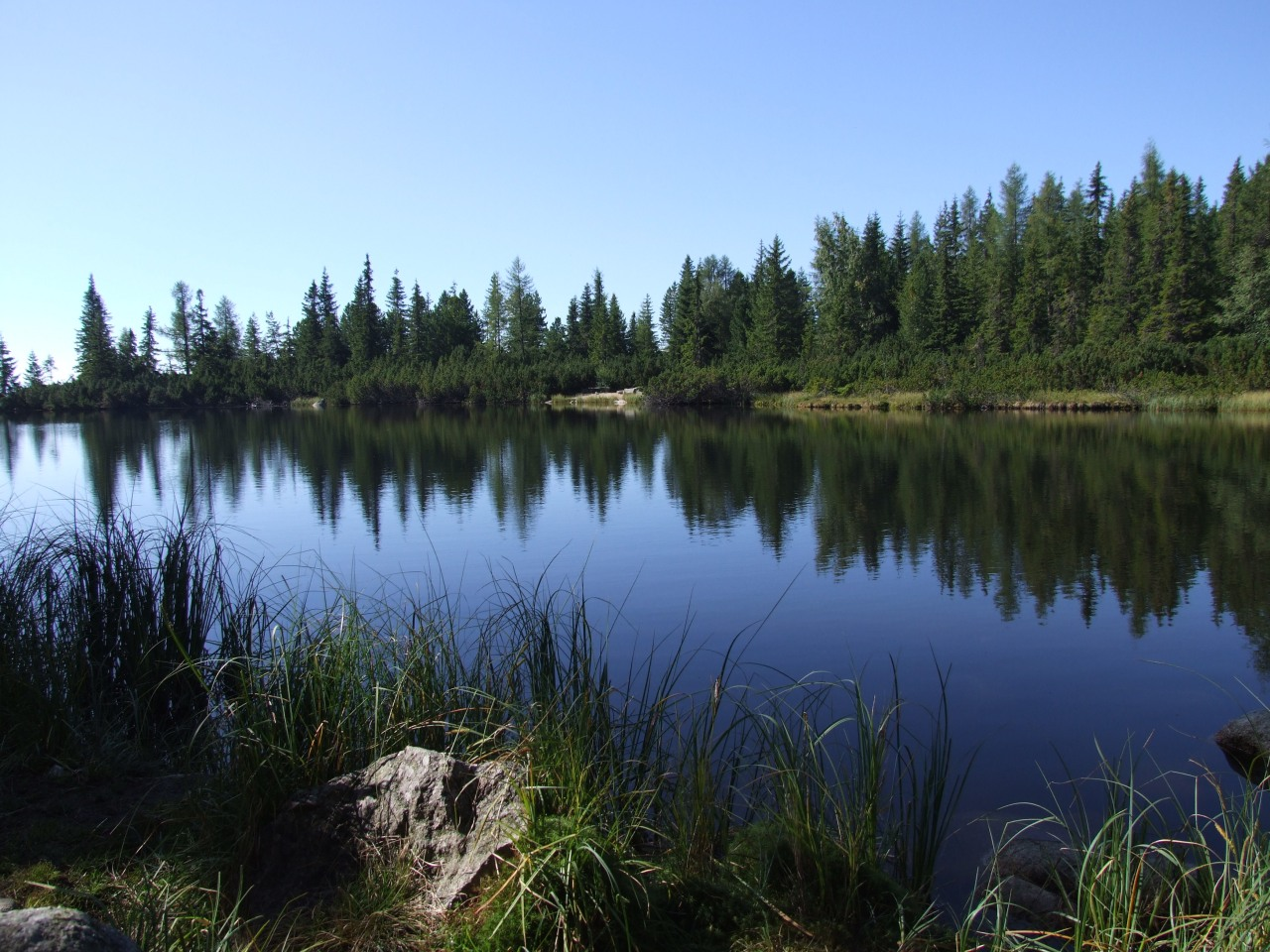 Jamski Staw (Jamské pleso)